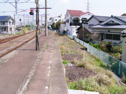 2005年3月29日に投稿者がja:国分駅 (鹿児島県)にて撮影。